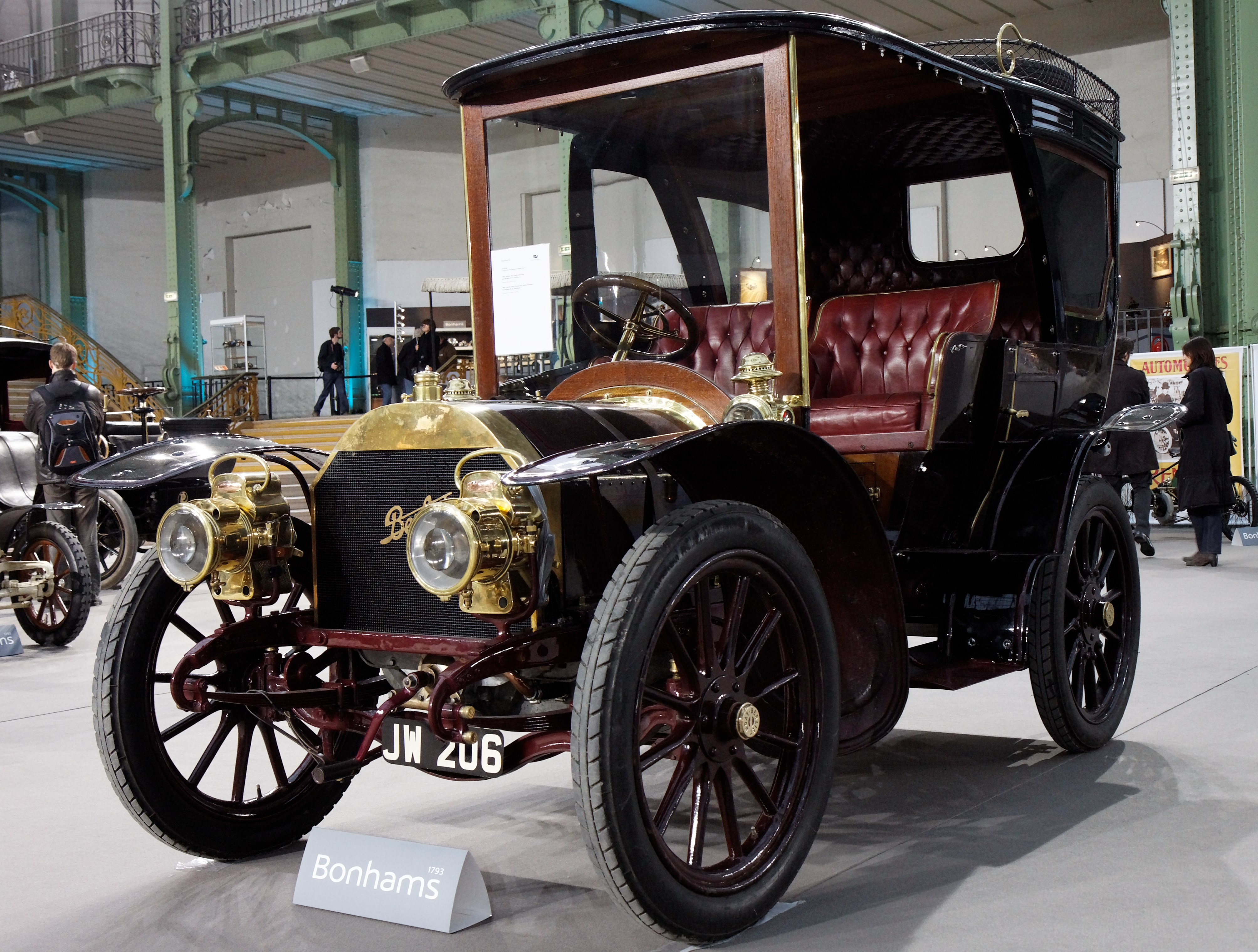 Berliet 20 CV Demi-limousine